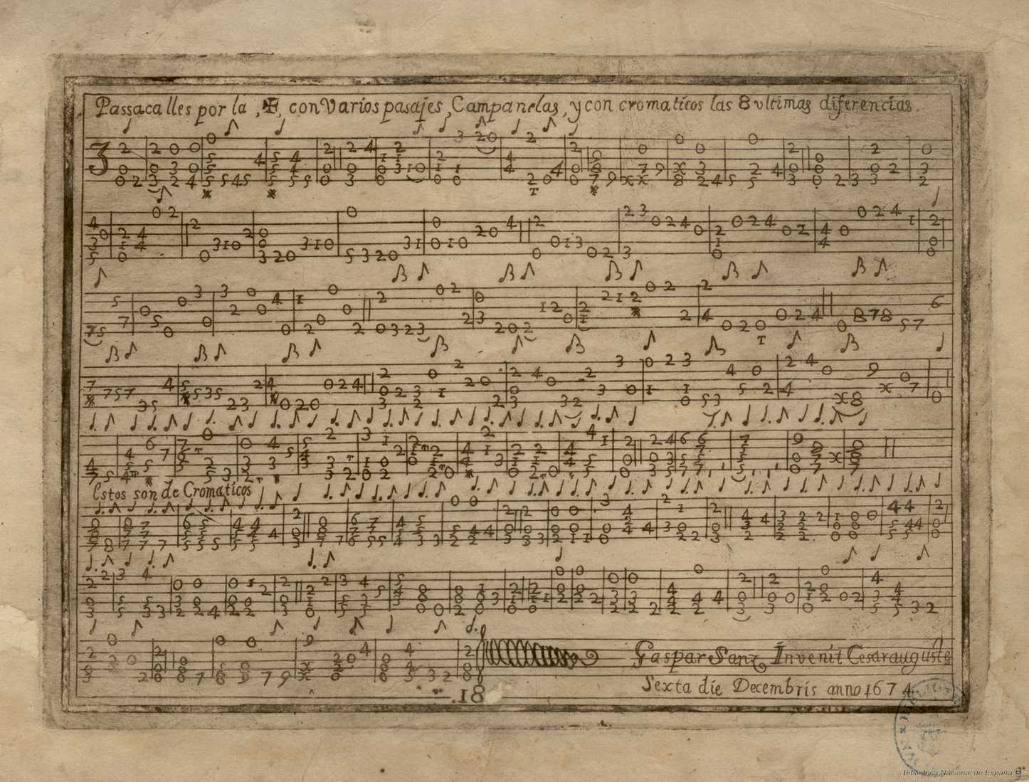 Example of tablature manuscript from Instrucciòn de Mùsica sobre la Guitarra Española